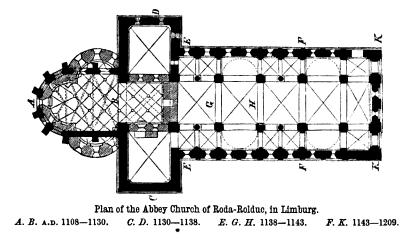 Grundriss der Abteikirche Rolduc mit dem gotischen Chor des 15. Jahrhunderts im Zustand von 1865 (Chormauerwerk fett gesetzt)